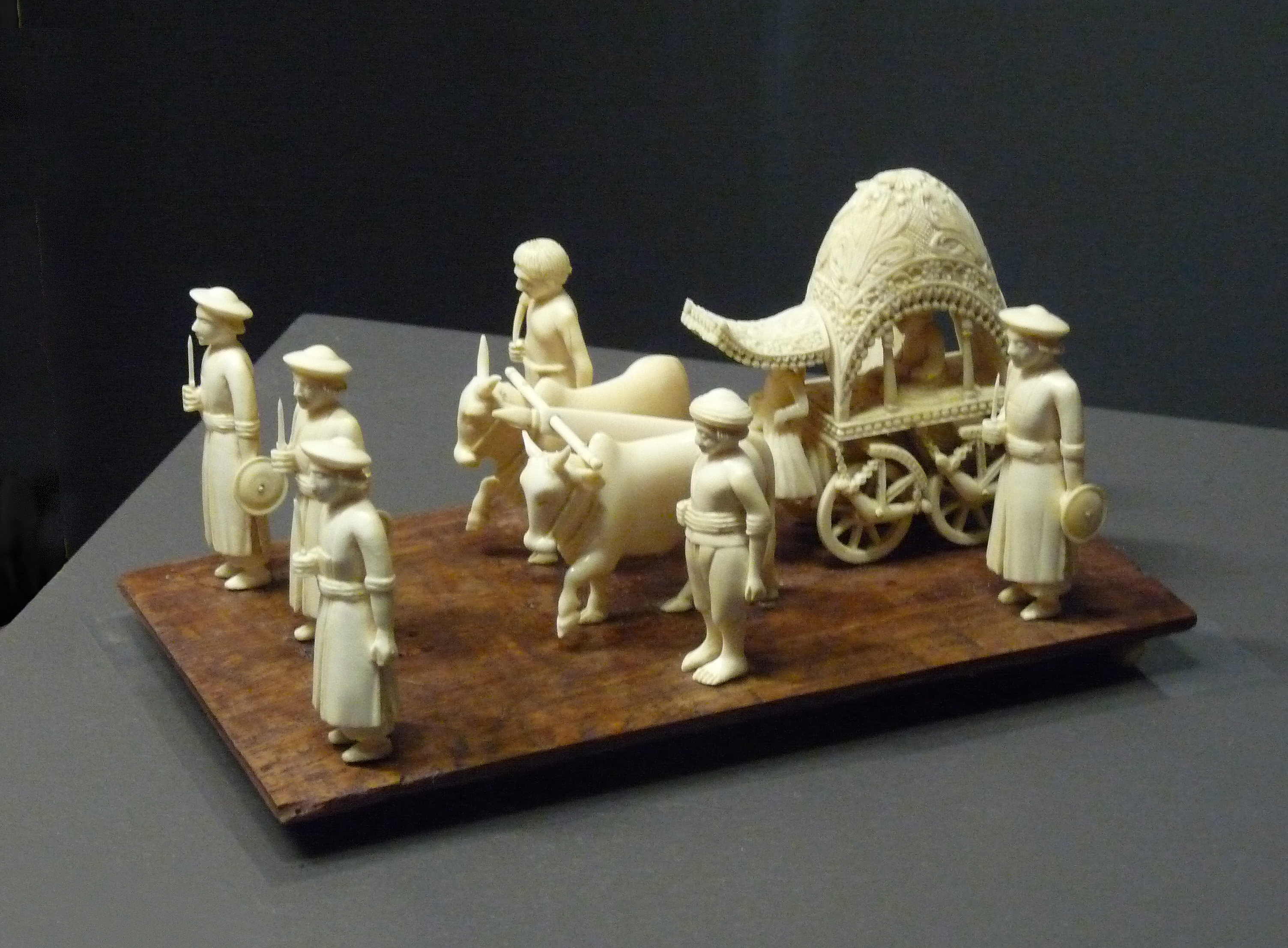 Cipayes et char de procession. Ivoire sculpté et ciselé. Inde, Bengale. Fin du 18e-début du 19e s. Musée de la Compagnie des Indes